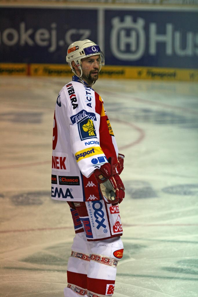 Josef Beránek, Czech ice hockey player, Bílí Tygři Liberec vs. HC Slavia Praha 5:2 (0:1,1:1,4:0)